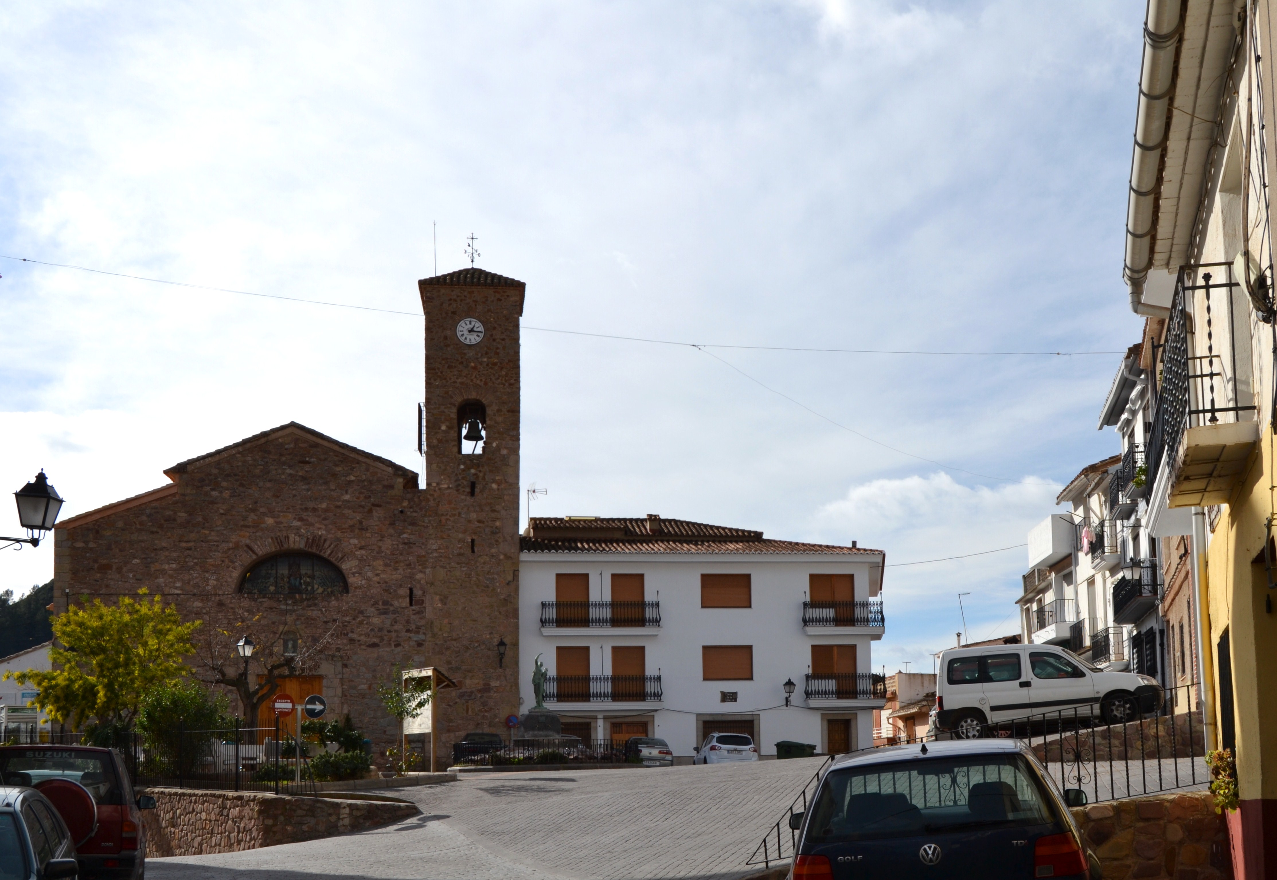 Plaça de l'església, Almedíxer.